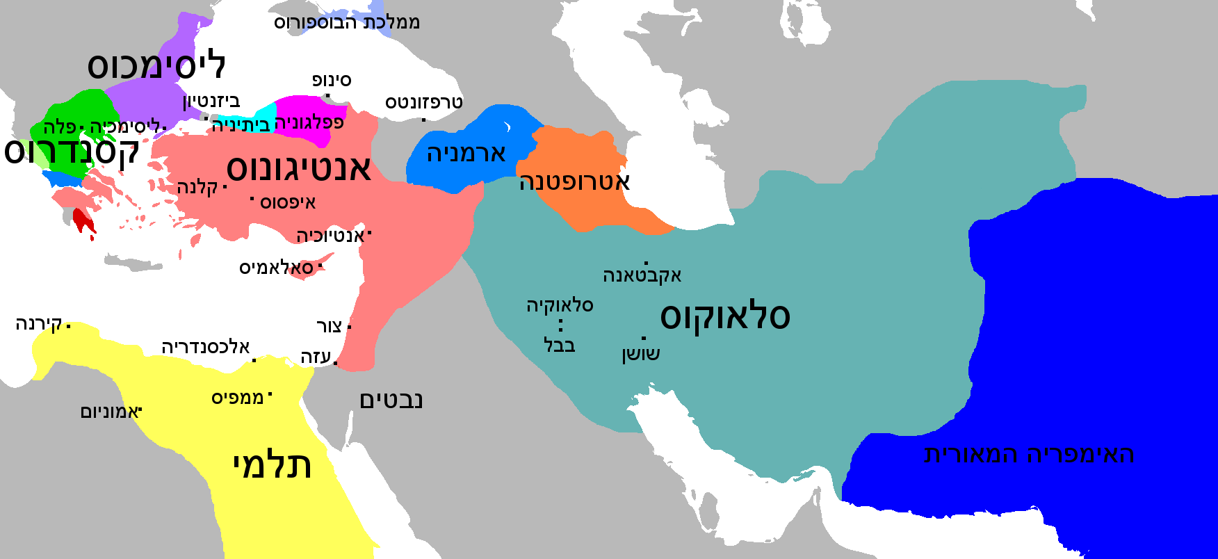 Diadoch